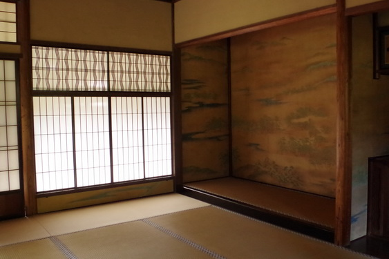 臨春閣の書院の障子。臨春閣は桃山時代に豊臣秀吉が建てた聚楽第の遺構と伝えられていたが、現在では和歌山県岩出市にあった紀州徳川家の別荘・巌出御殿（いわでごてん）ではないかと考えられている。現在横浜三渓園